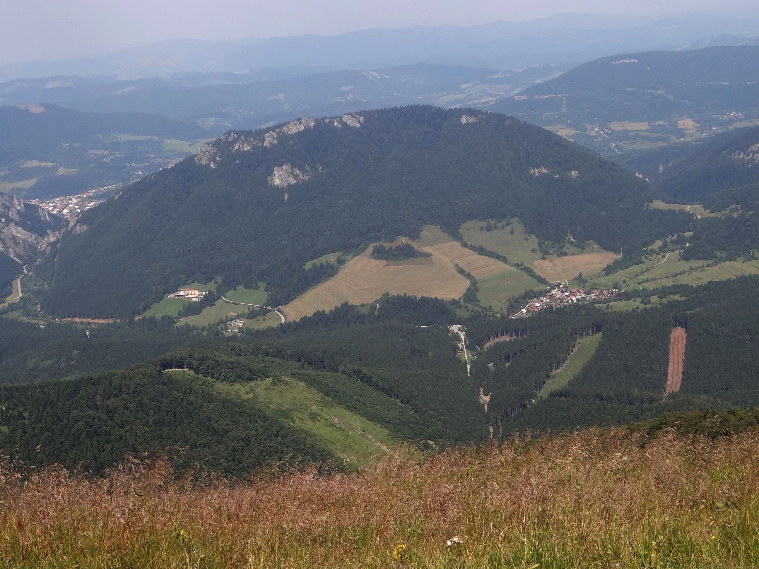 Boboty